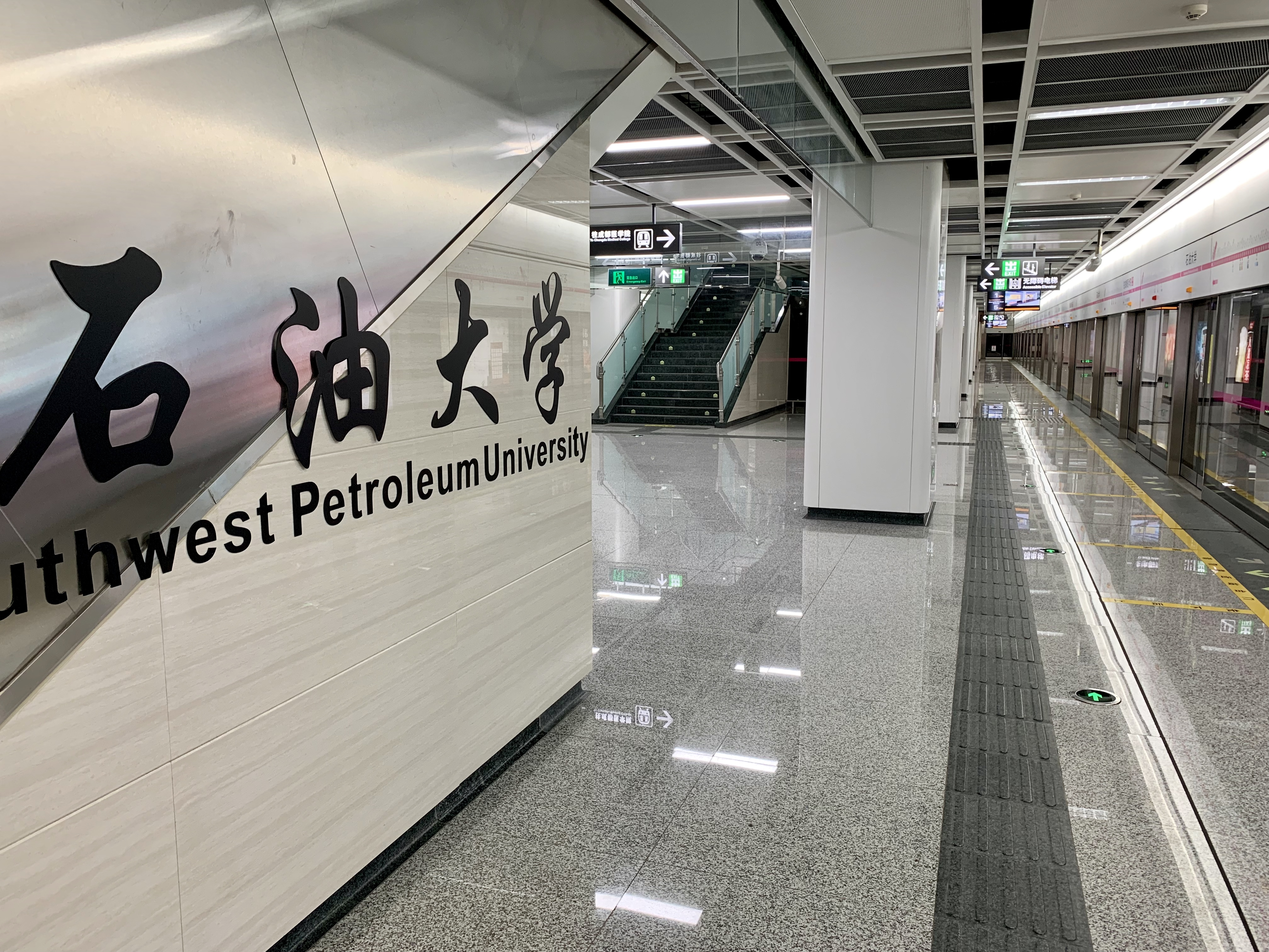 成都地铁石油大学站